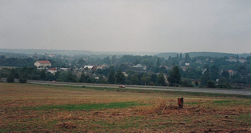 Niederwiesa, Sachsen